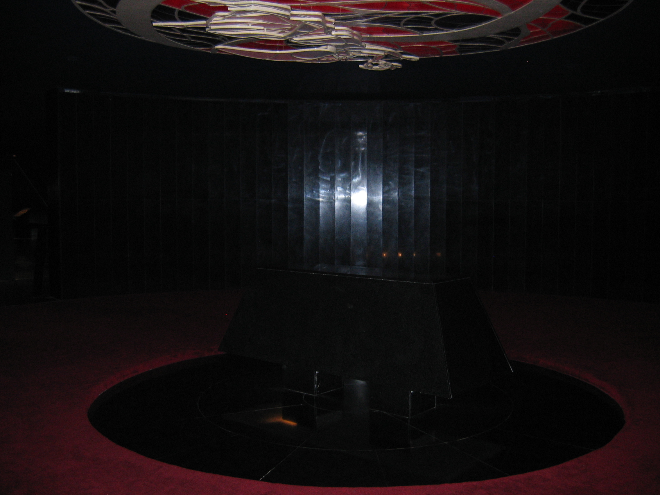 התמונה צולמה בידי, אורי רוזנהק.